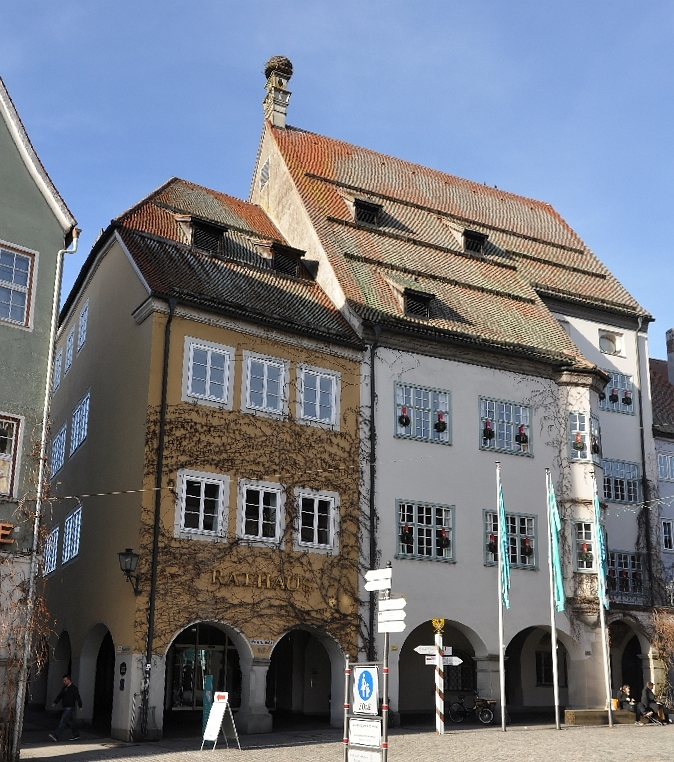 Ein Spaziergang durch Isny im Allgäu im Dez 2012